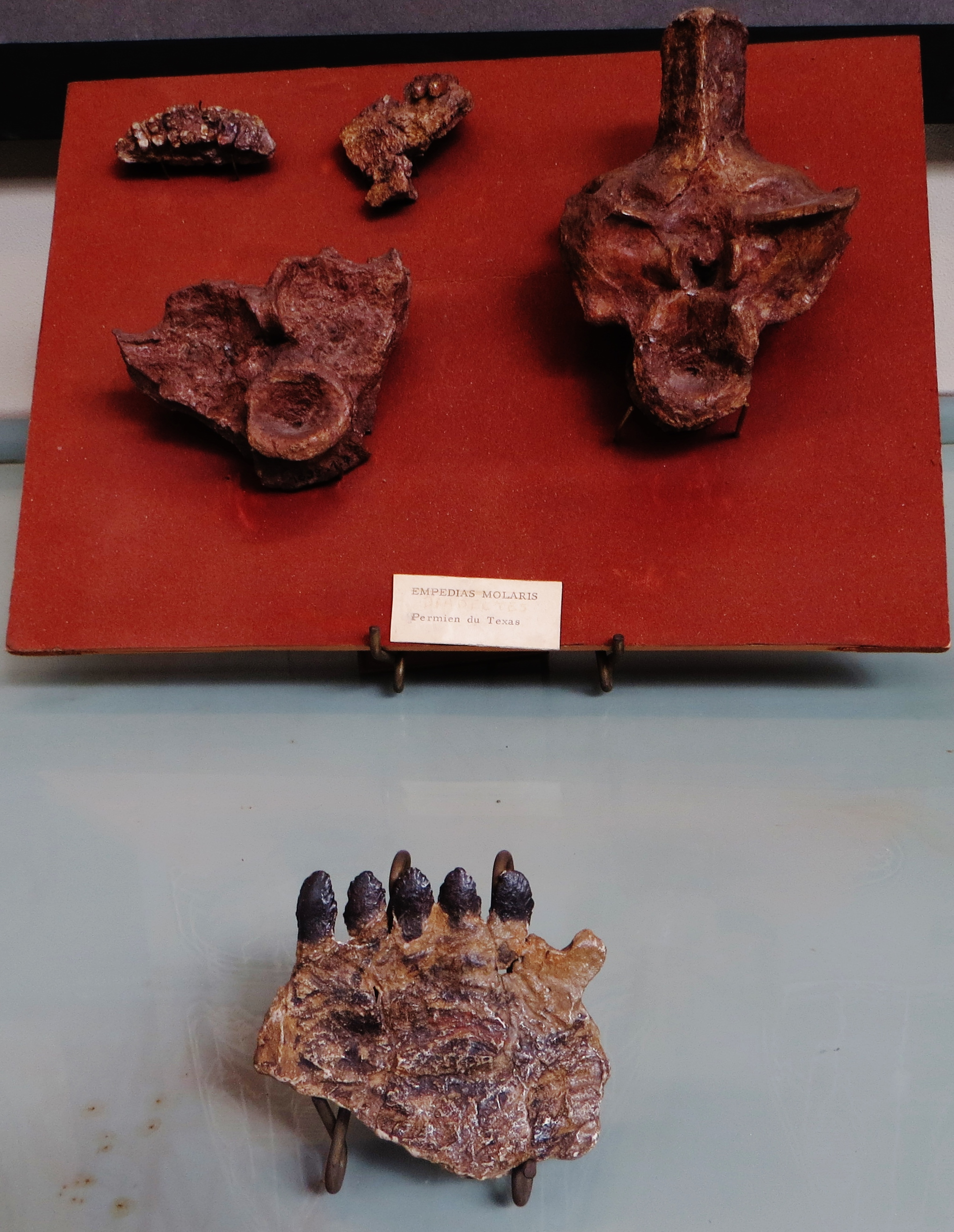 Fossil of Empedias, an extinct tetrapod- Took the photo at Musee d'Histoire Naturelle, Paris